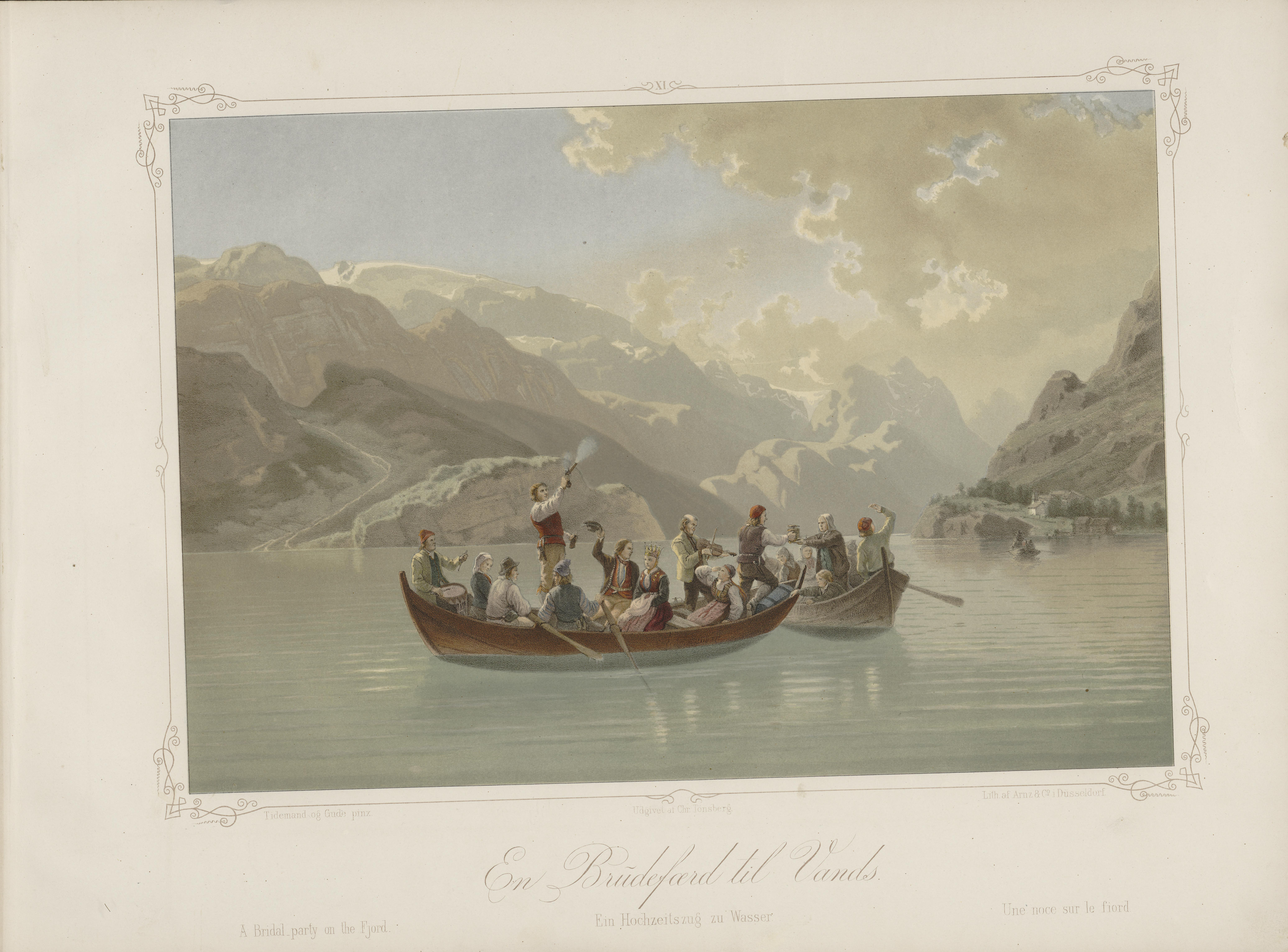 Illustrasjon hentet fra boken Norske Folkelivsbilleder av Tidemand, Adolph og utgitt av Chr. Tønsberg (Christiania, 1854). Tidemand og Gude; En Brudefærd til Vands.